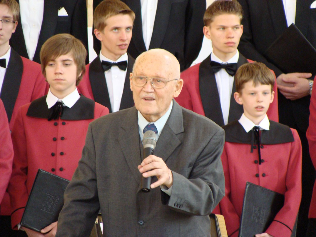 Stefan Stuligrosz na tle chóru "Poznańskie Słowiki" podczas koncertu w kościele Najświętszego Serca Jezusa w Śremie.